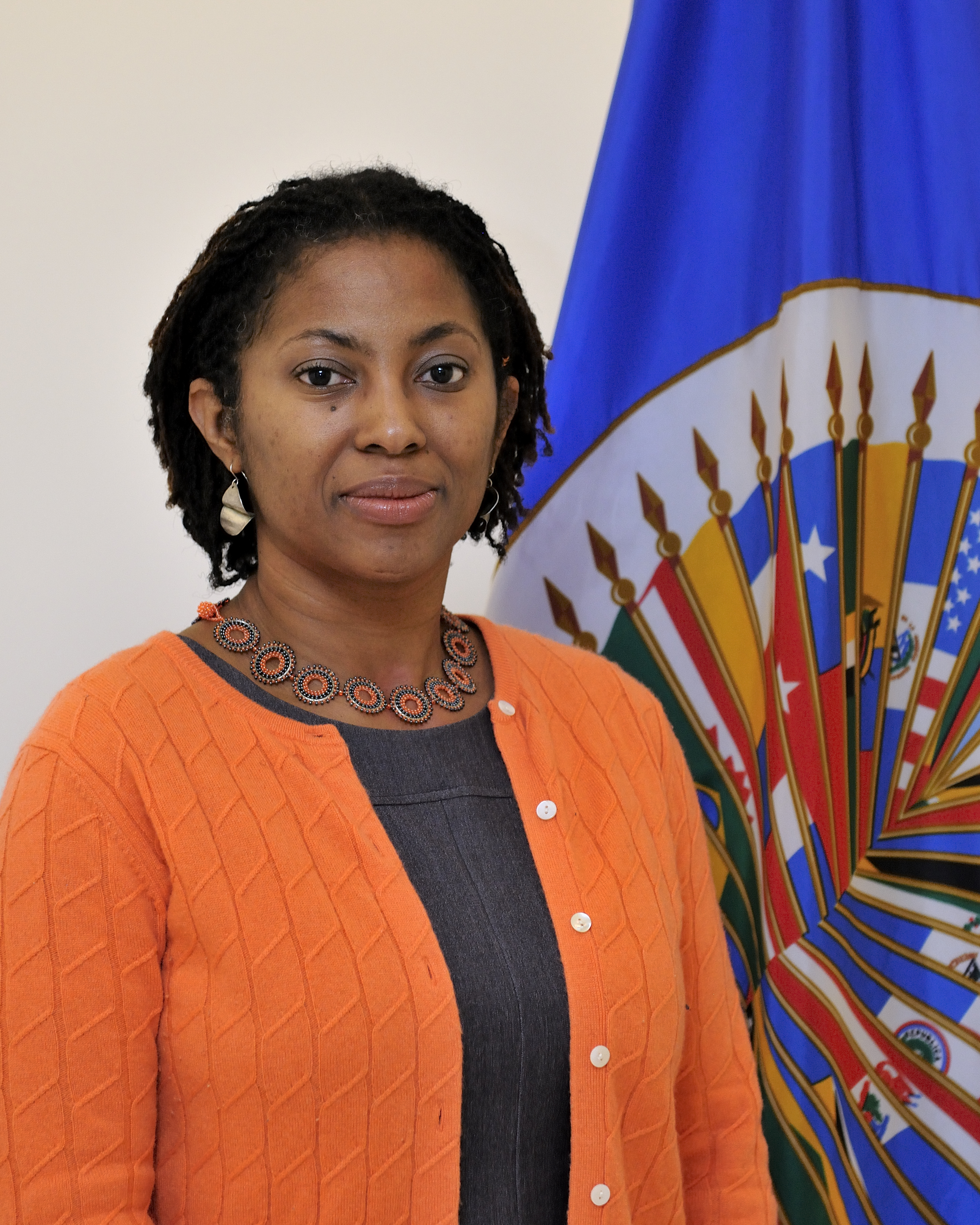 Tracy Robinson es ciudadana de Jamaica. Fue elegida en la 41ª Asamblea General de la OEA en junio de 2011 por el período reglamentario de cuatro años, contados a partir del 1º de enero de 2012. Es abogada y dicta clases de derecho en la Universidad de West Indies, Jamaica, donde dicta clases de derecho y género, derecho constitucional, y derechos humanos en el Commonwealth del Caribe. Ha sido consultora para organismos internacionales, tales como el Fondo de Naciones Unidas para las Mujeres y UNICEF, y ha asesorado de gobiernos del Caribe en temas relativos a legislación sobre temas de género y niñez, entre otros. La Comisionada Robinson ha sido editora de la revista de derecho del Caribe y ha escrito y publicado informes sobre diversos temas, tales como género, los derechos de las personas LGTBI, acoso sexual, derechos sexuales, el trabajo sexual y el derecho, y los derechos de los niños, entre otros temas. Se graduó en derecho en la Universidad de West Indies y tiene un posgrado en derecho de la Universidad de Yale, así como un título de grado en derecho civil de la Universidad de Oxford. Date: January 27, 2012. Place: Washington, DC. Credit: Juan Manuel Herrera/OAS